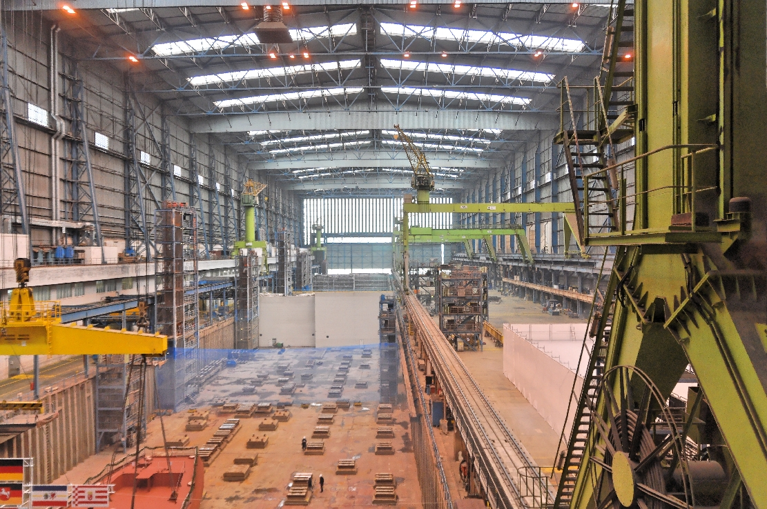 Meyer Werft, Papenburg 2013